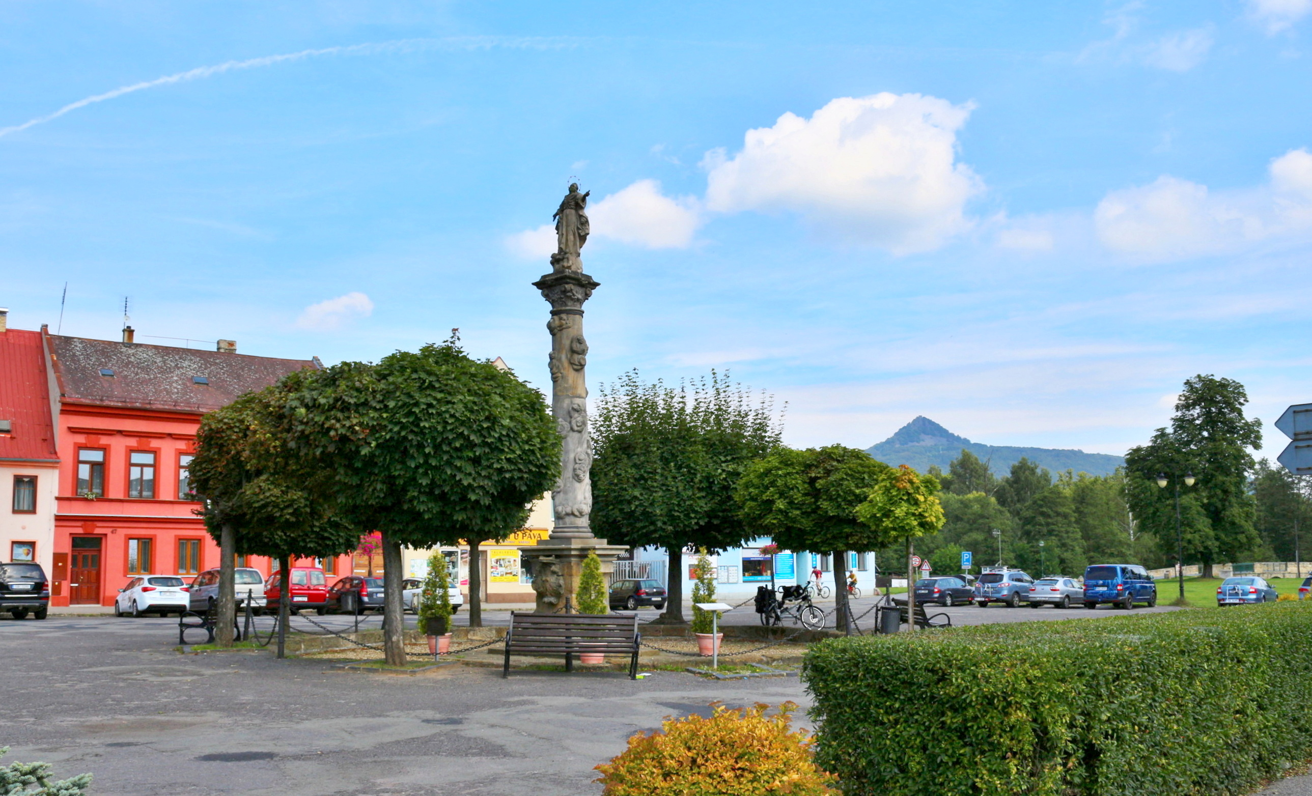 Náměstí 1. máje se sloupem Panny Marie v Mimoni